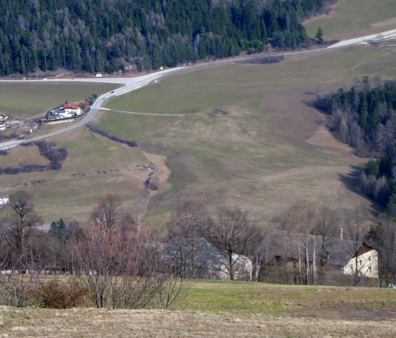 L'opera 18, sciaves